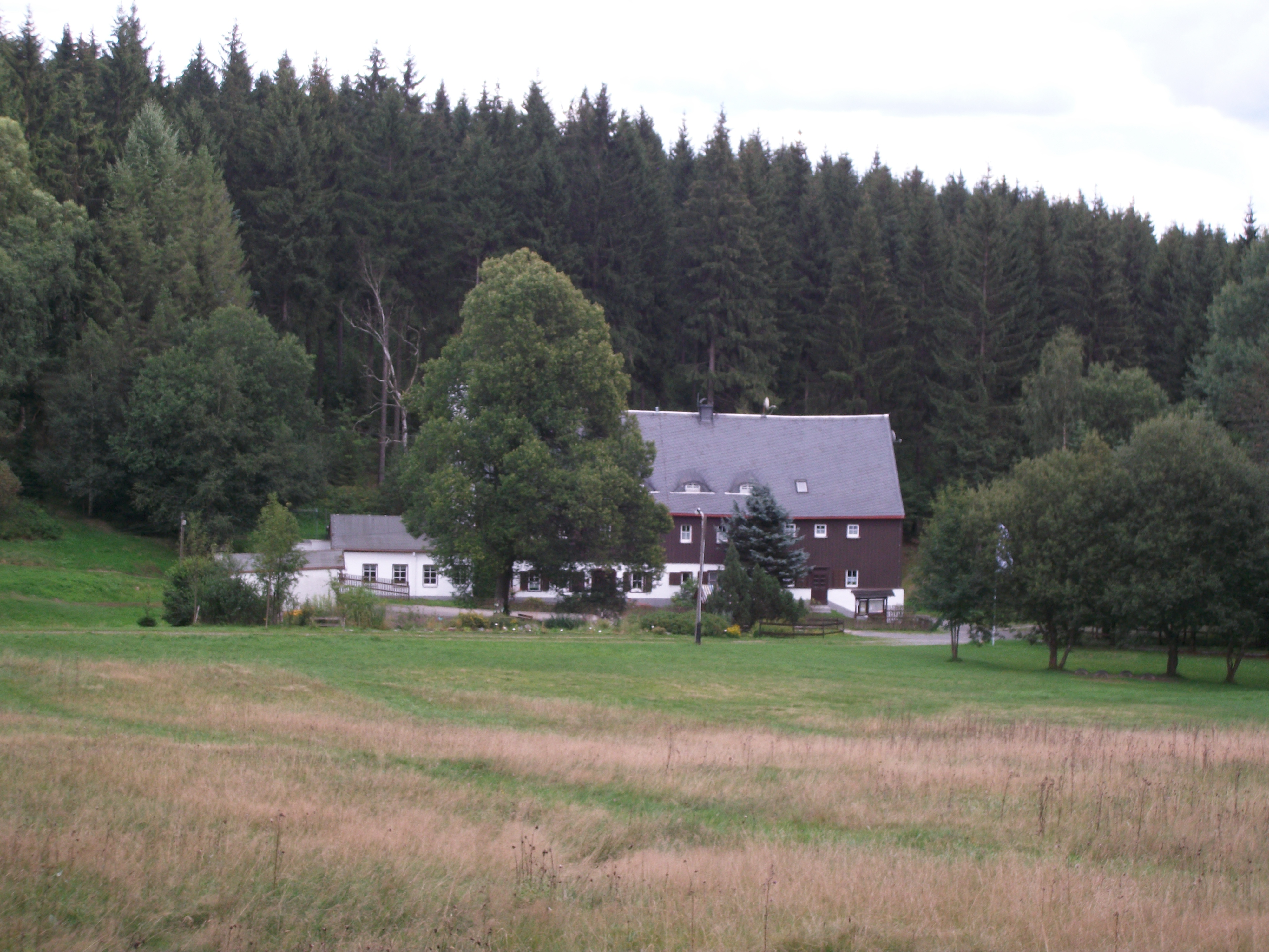 Grumbach, Jugendherberge